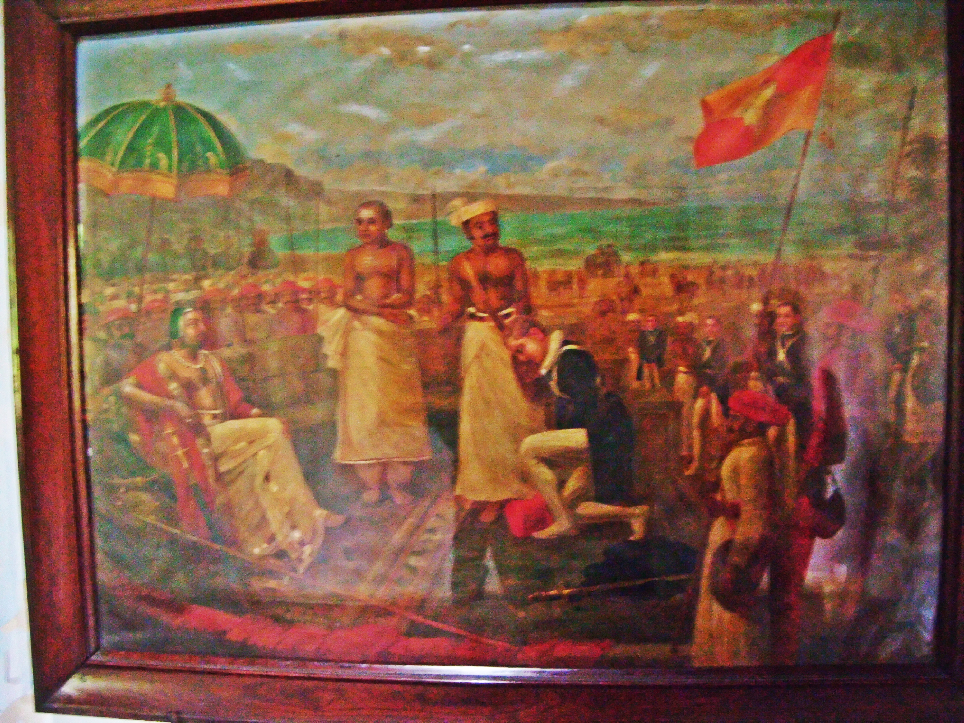 Eustachius de Lannoy ergibt sich 1741, nach der Schlacht von Colachel, Gemälde, um 1750, Padmanabhapuram Palast, Tamil Nadu, Indien